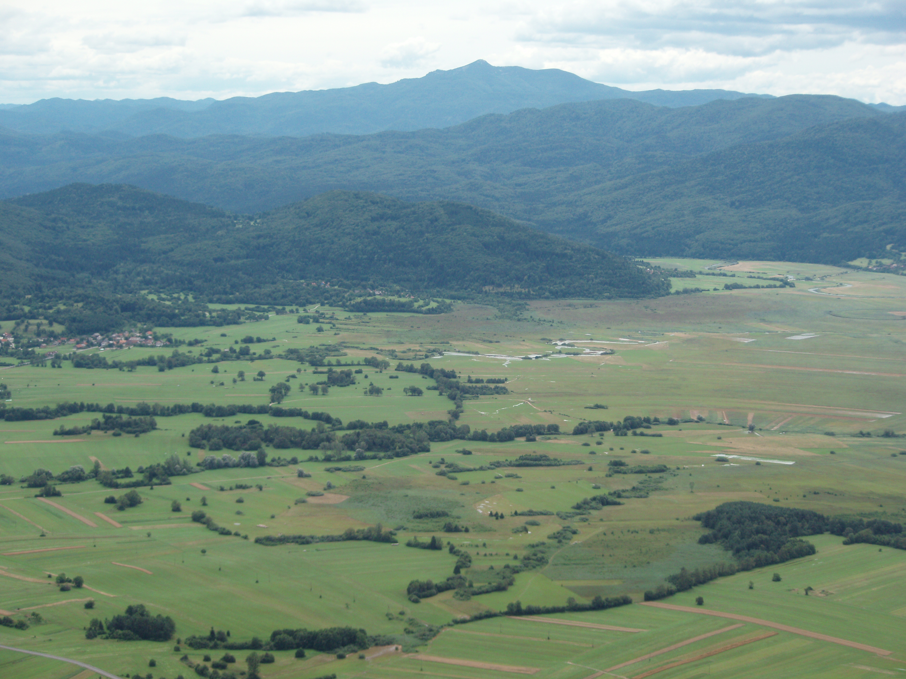 Poljé de Cerknica